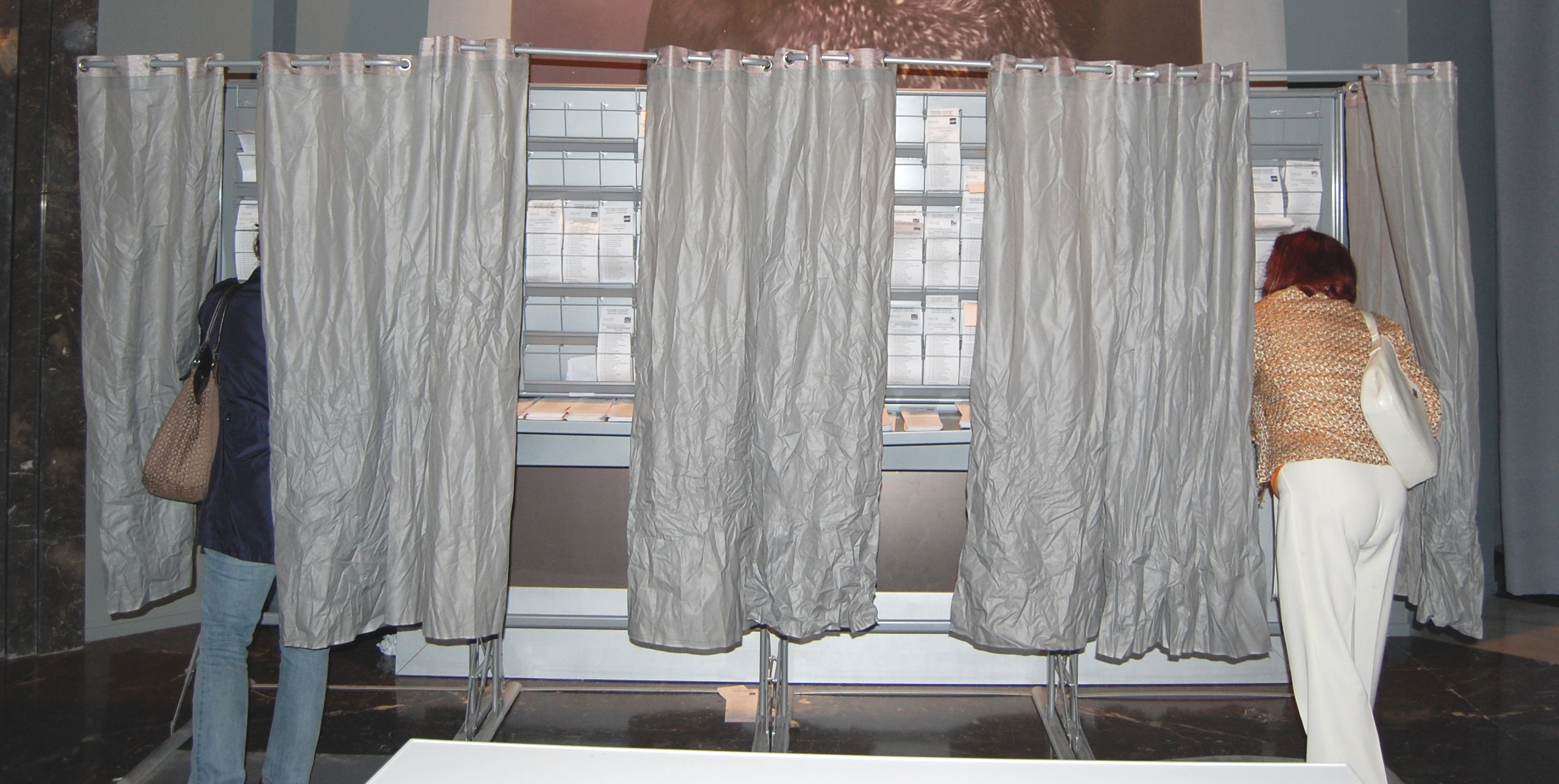 Cidadãs escolhem as papeletas eleitorais nas eleições municipais em Vigo, Galiza.